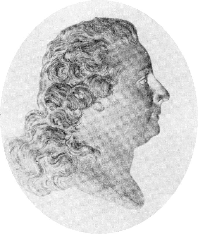 Johan Gustaf von Carlson, medaljong av Johan Tobias Sergel